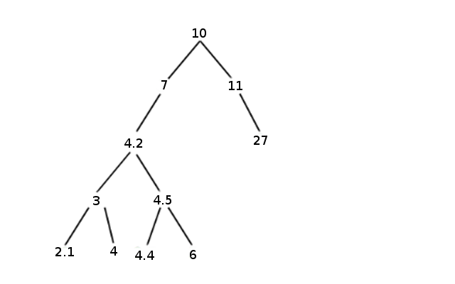 Arbre binaire de recherche rééquilibré après application des critères de l'arbre bouc-émissaire.